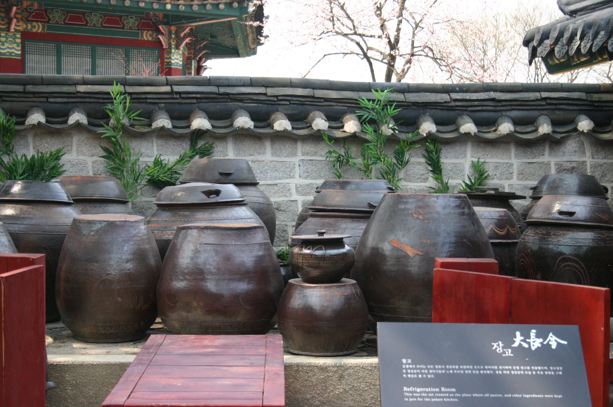 Dae Jang Geum Theme Park